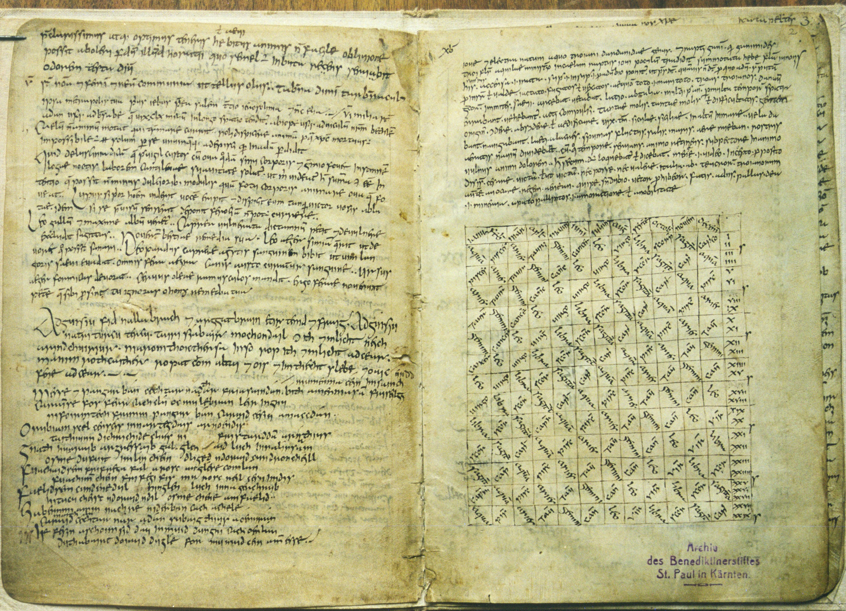 Riechenauer Schulheft, fol 1v/2r [1]